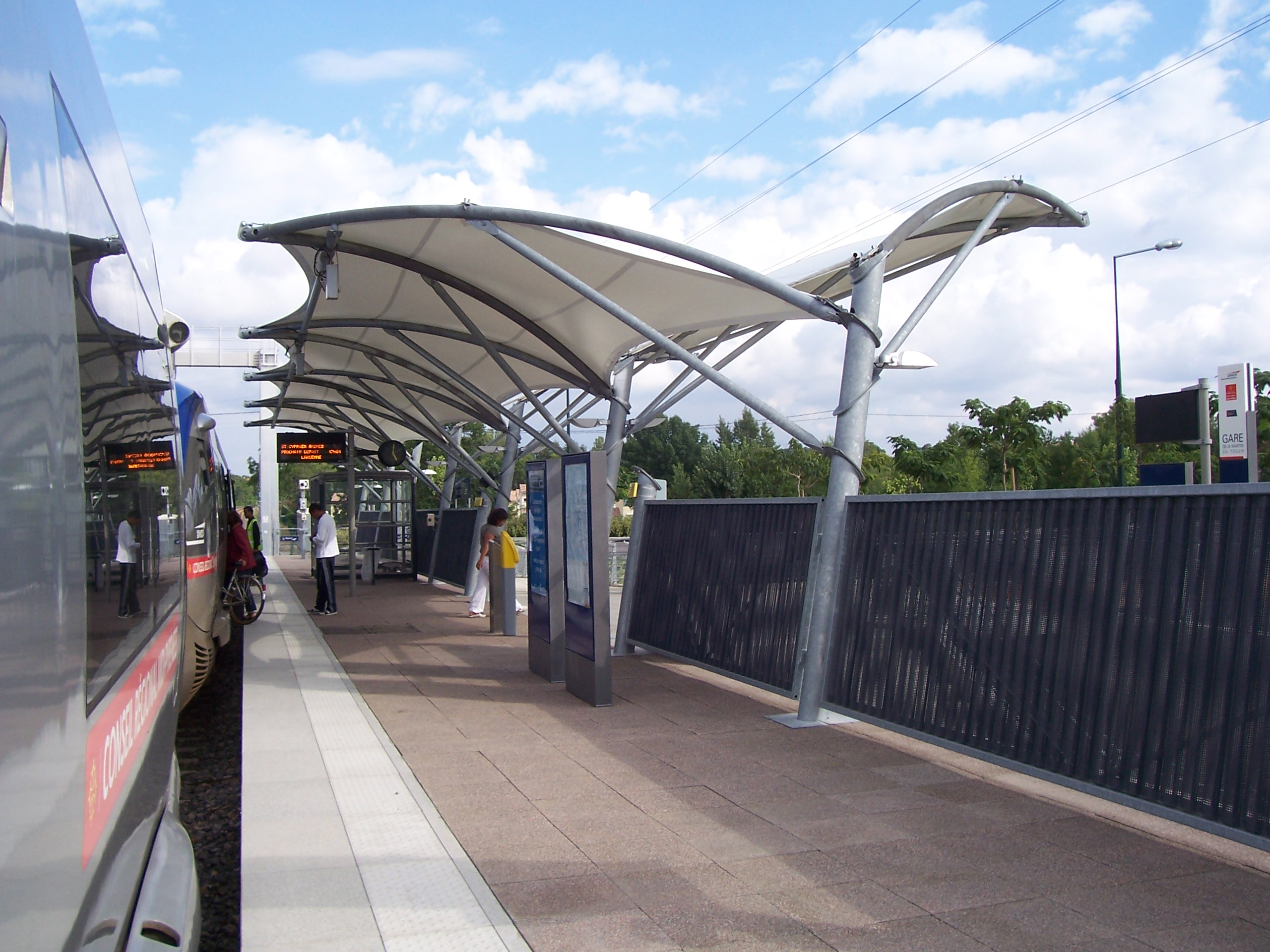 Toulouse, France - Quai et train TER Midi-Pyrénées en gare de Saint-Martin-du-Touch sur la ligne C de Tisséo.